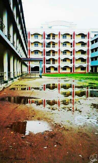 hggh